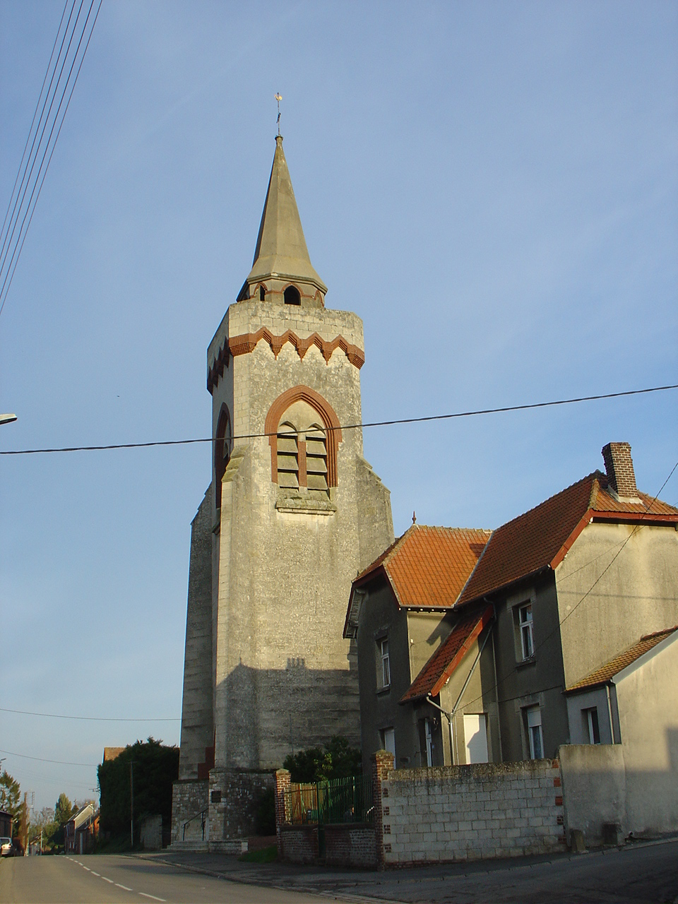 Église de Fontaine-lès-Croisilles